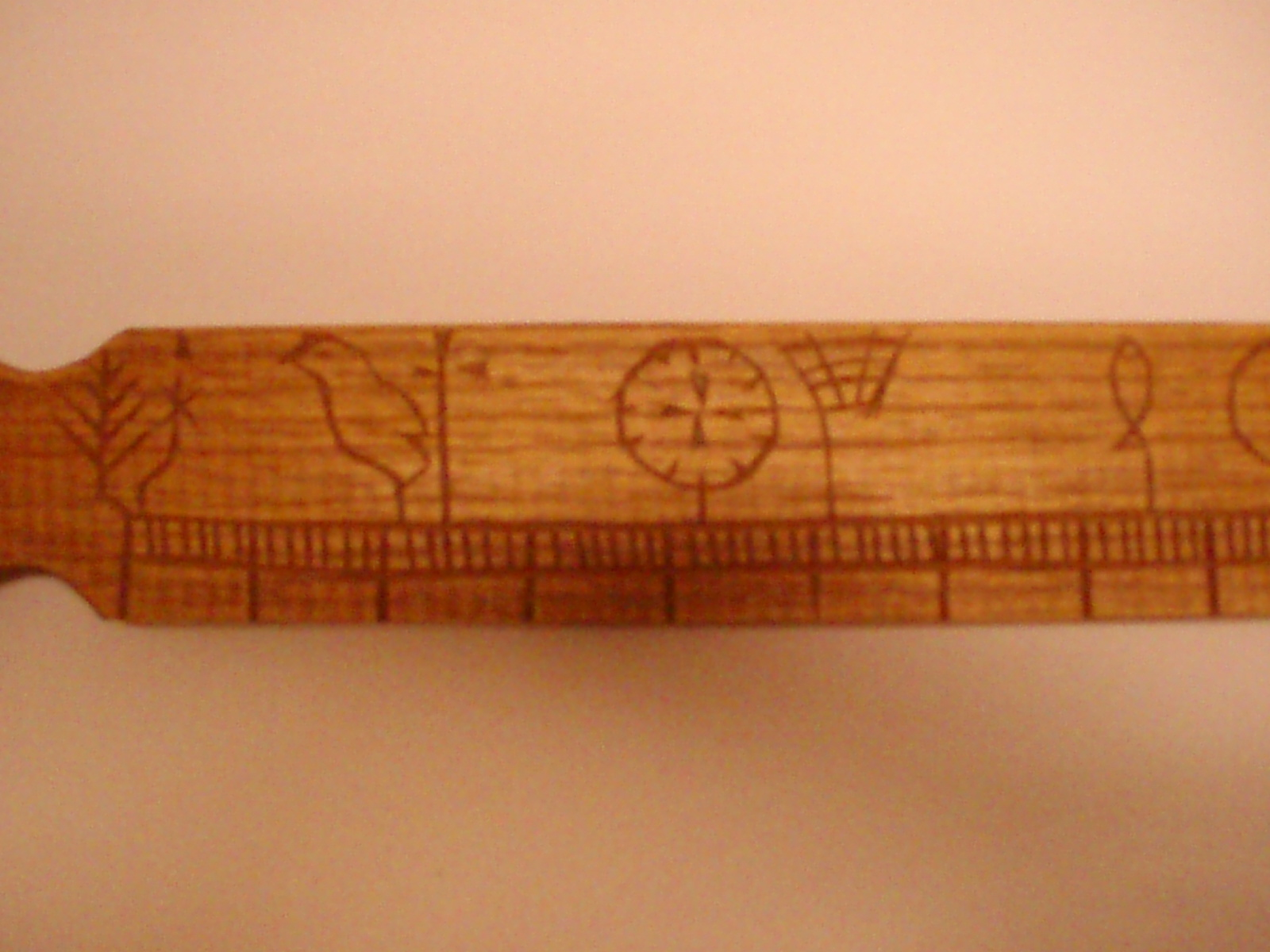 Primstav, norwegian - detail, start summer (Starts left at april 14.).